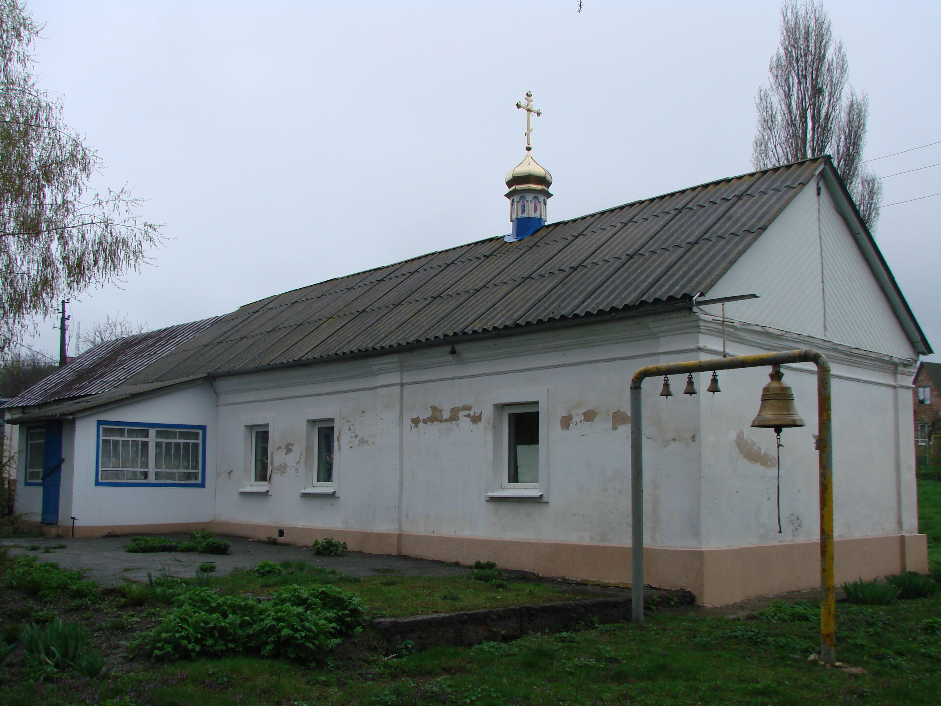 Дзвіниця Михайлівської церкви з теплою церквою в ім'я Всіх Святих, село Северинівка